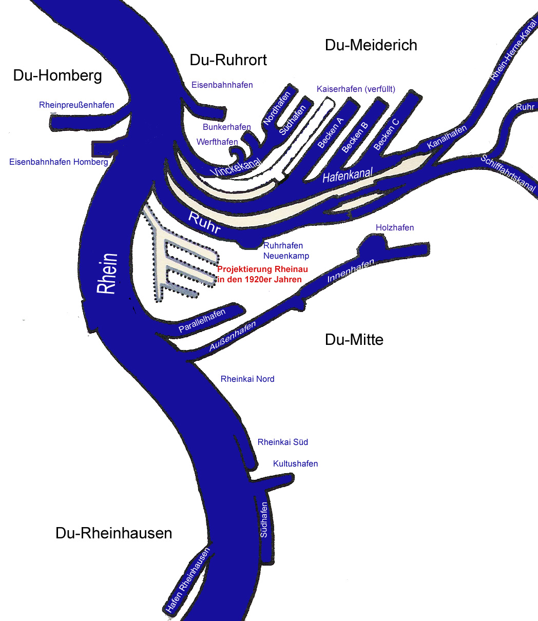 Skizze der Duisburger Häfen eigene Zeichnung Der Duisburger Hafen liegt überwiegend im Stadtteil Duisburg-Ruhrort. Ein weiterer Teil zwischen den Stadtteilen Neuenkamp und Wanheimerort und auf der linken Rheinseite in Rheinhausen. Die Werkshäfen befinden sich im Norden und Süden der Stadt.